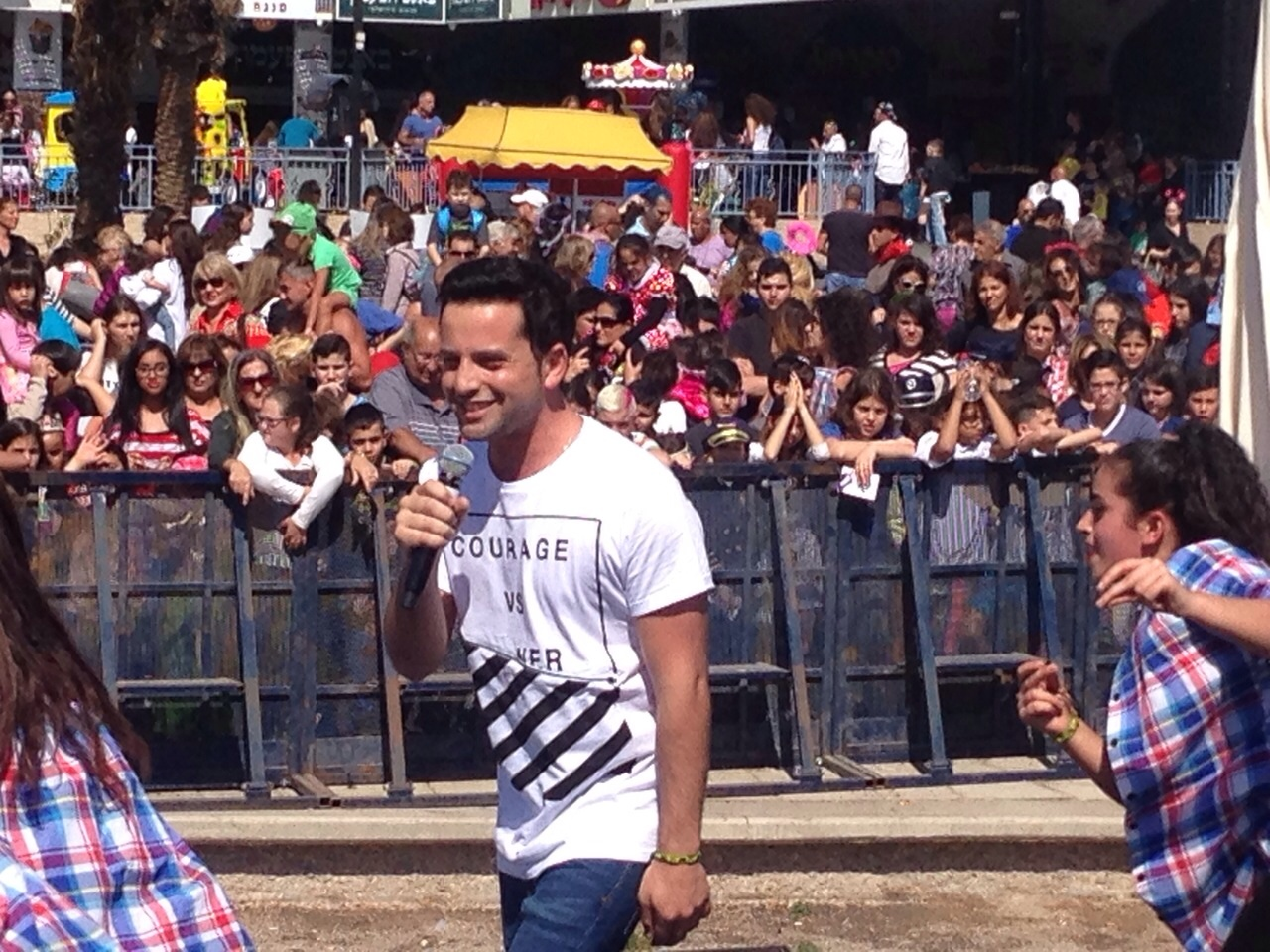 בן רביד